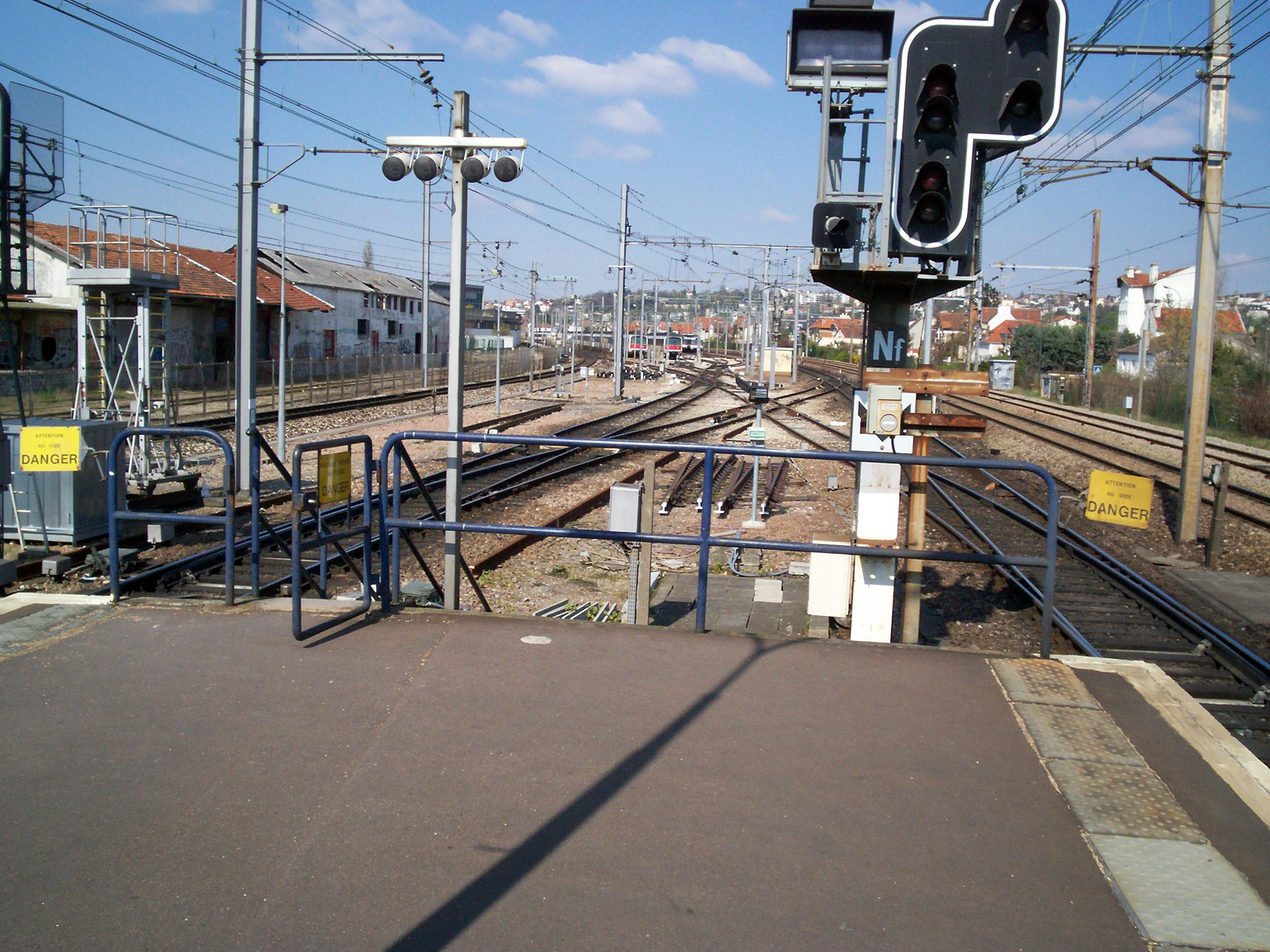 Gare de La Varenne-Chennevières